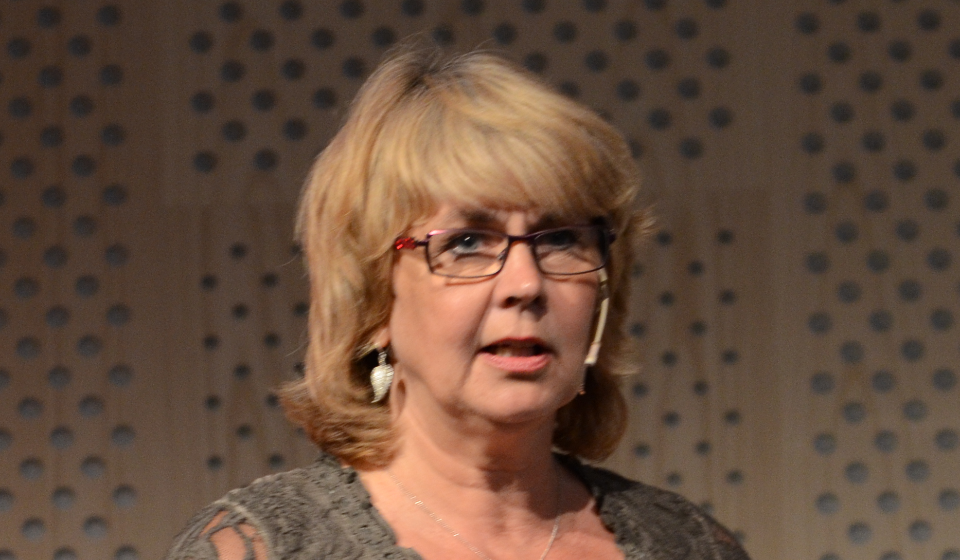 Marita Ljung, statssekreterare hos Annie Lööf